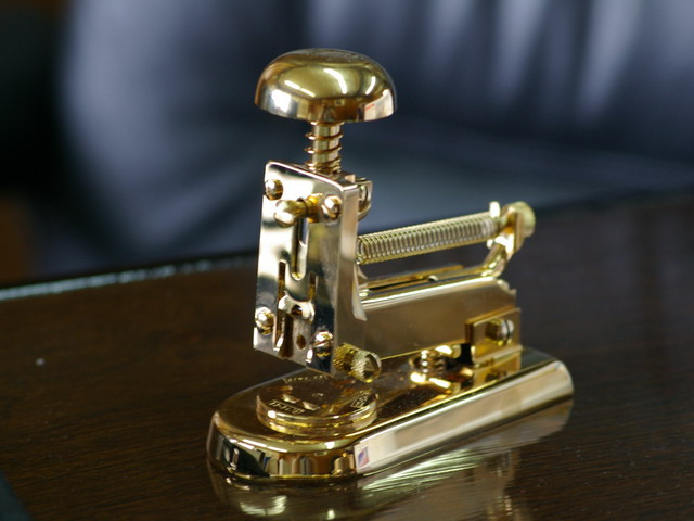 Grapadora Casco modelo 5.L dorada